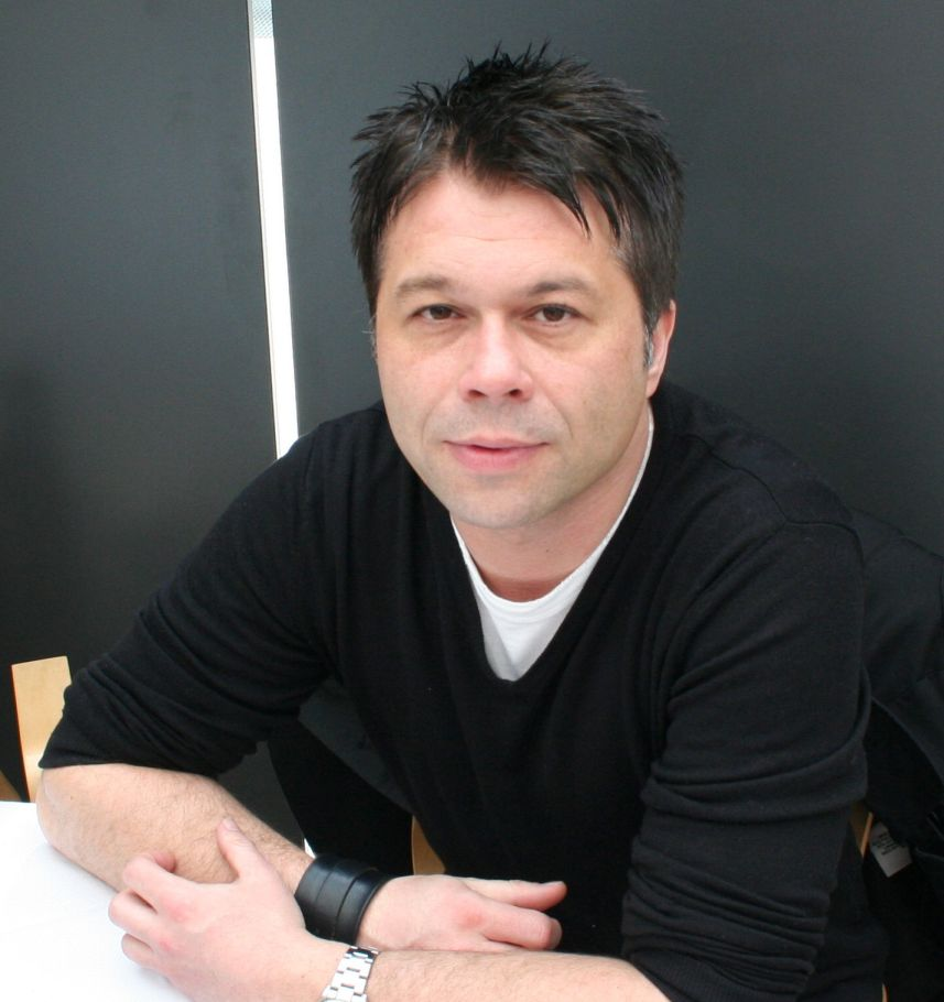 Markus Kavka auf der Leipziger Buchmesse zur Veröffentlichung seiner Kolumnensammlung "Elektrische Zahnbürsten"